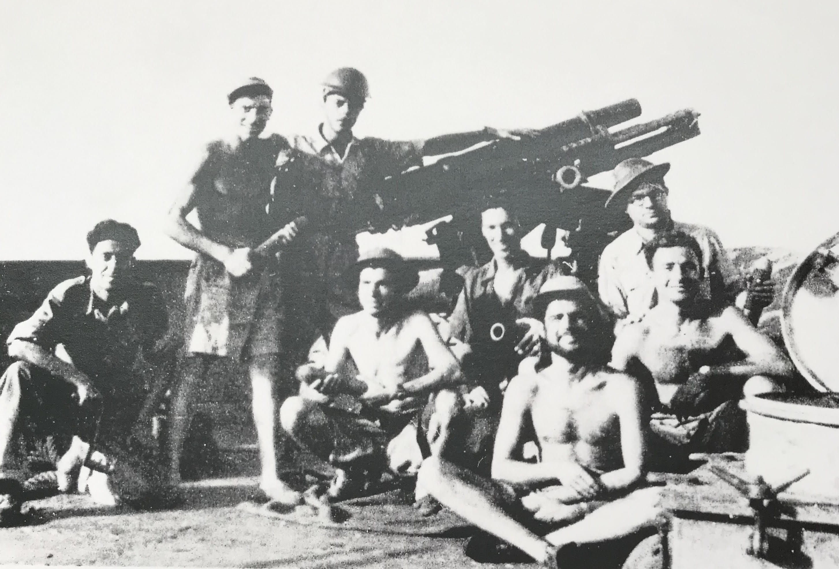 צוות תותח באח"י וג'ווד